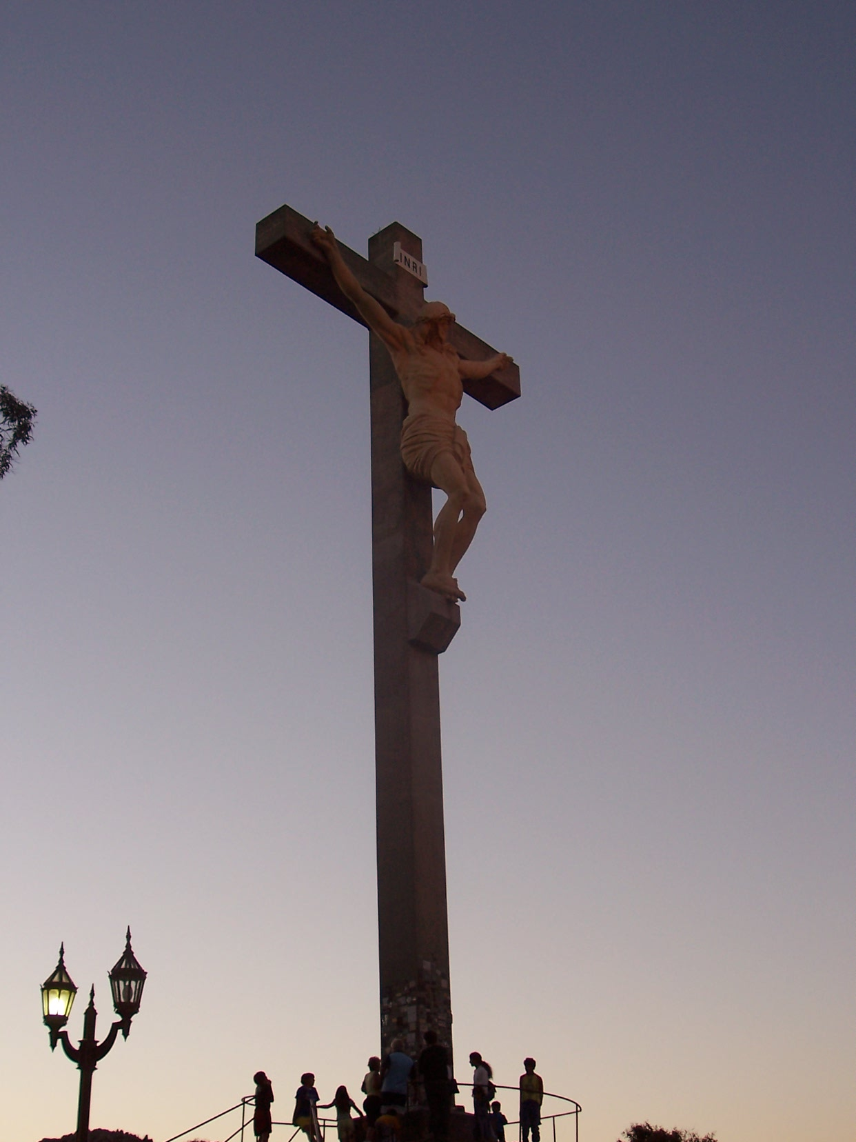 El "Cristo" ubicado en el parque del Via Crusis, en la ciudad de Tandil, a 350 km. de la capital argentina.